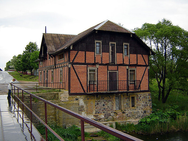 Беларуская (тарашкевіца): Гервяты